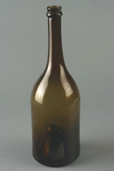 Le “bô” est une bouteille soufflée à la bouche. On l’identifie à son fond coupant. Contenance d'environ 70 cl. Il est réservé à la conservation de l’eau de cerise, et plus précisément au kirsch de Fougerolles (Haute-Saône). Produit de 1780 au milieu du XXème Siècle. Production relancé suite à l'obtention de l'AOC Kirsch de Fougerolles. en 2010.